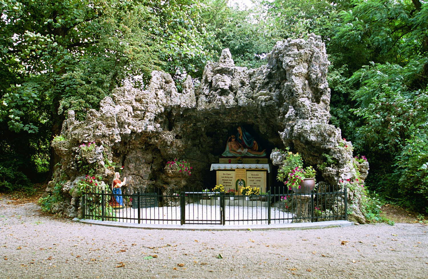 Mariengrotte hinter der Pfarrkirche St. Peter Viersen-Bockert Ort: Deutschland/NRW/Viersen-Bockert/Pastor-Lennatz-Platz/hinter der Pfarrkirche